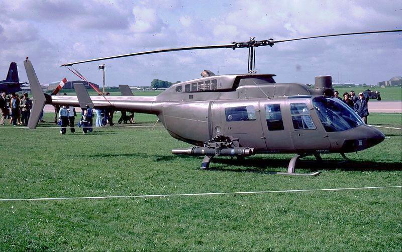 Bell 206L TexasRanger at RAF Mildenhall